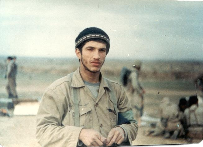 شهید حسن نوفلاح